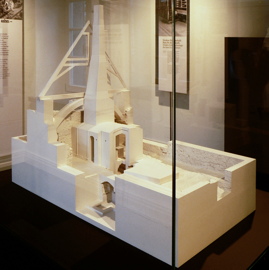 Rekonstruktion des freigelegten Brennofens im Altes Brennhaus in Fürstenberg